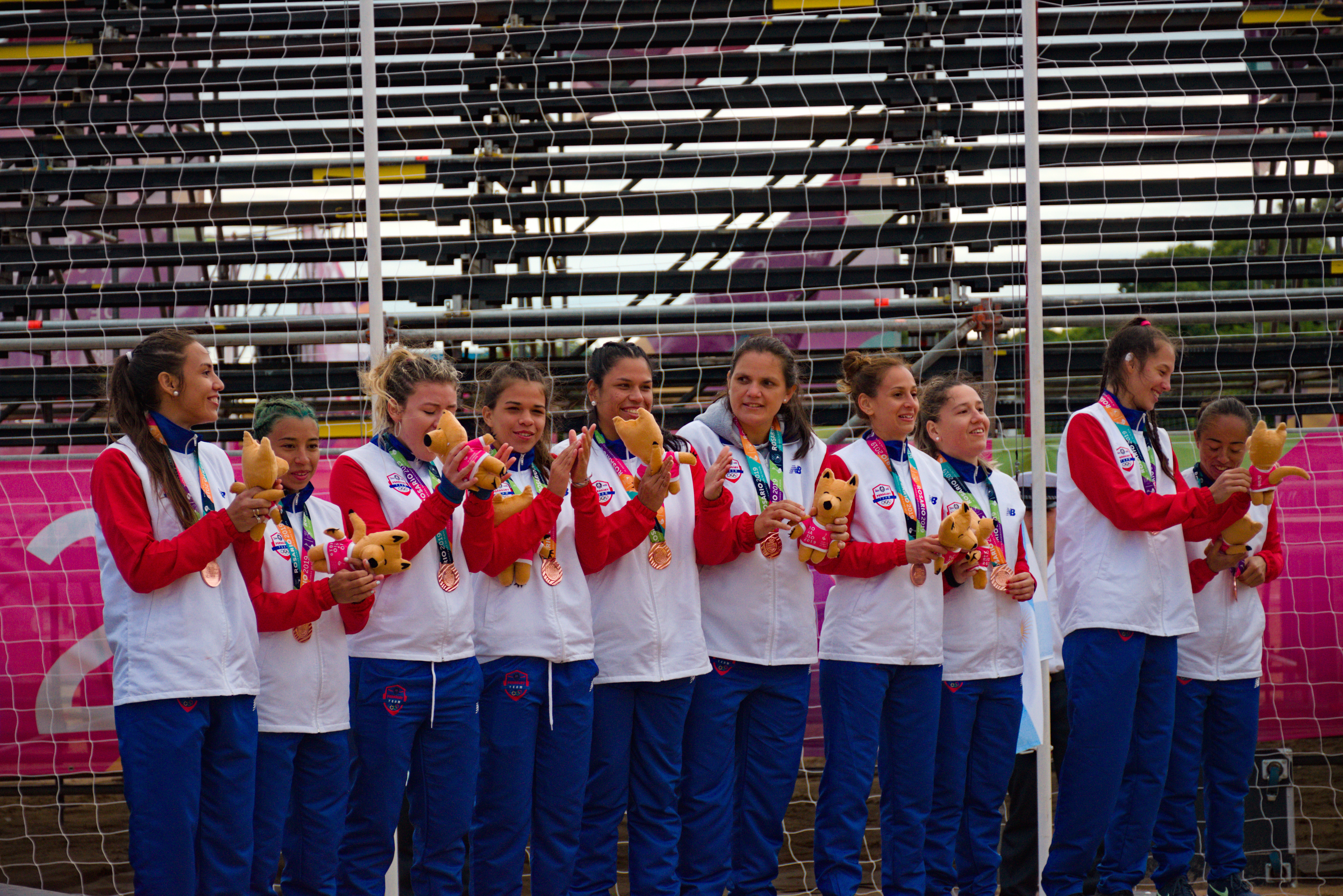 Ceremonia de premiación de handball de playa femenino en los Juegos Suramericanos de Playa 2019